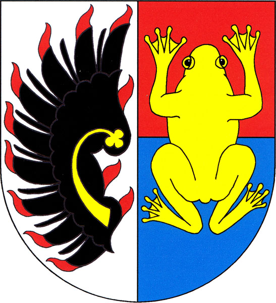 Znak obce Žabonosy